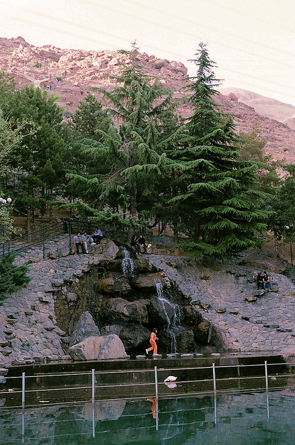 Jamshidieh Park, Tehran